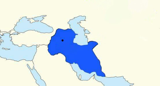 Atabəylər Eldənizlər dövlətinin ərazisi